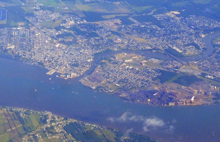 Vue aérienne de Sorel-Tracy, Québec. Cropped.